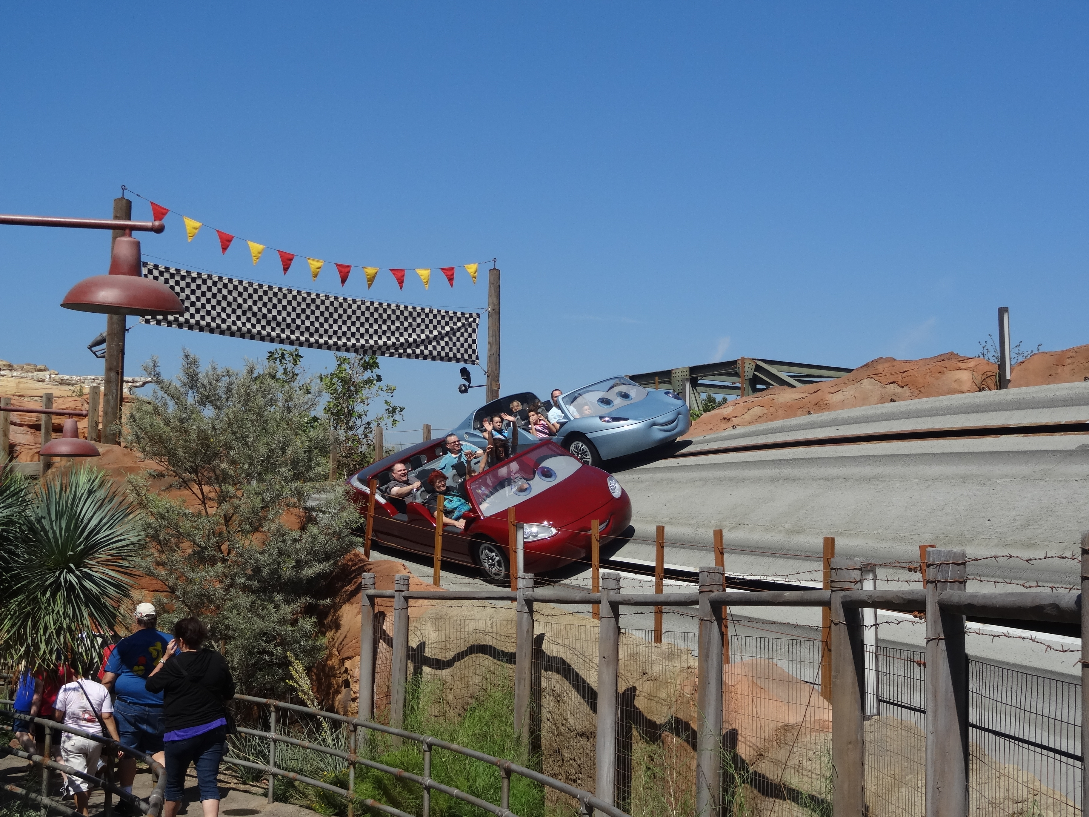 Radiator Springs Racers à Disney Califonia Adventure.